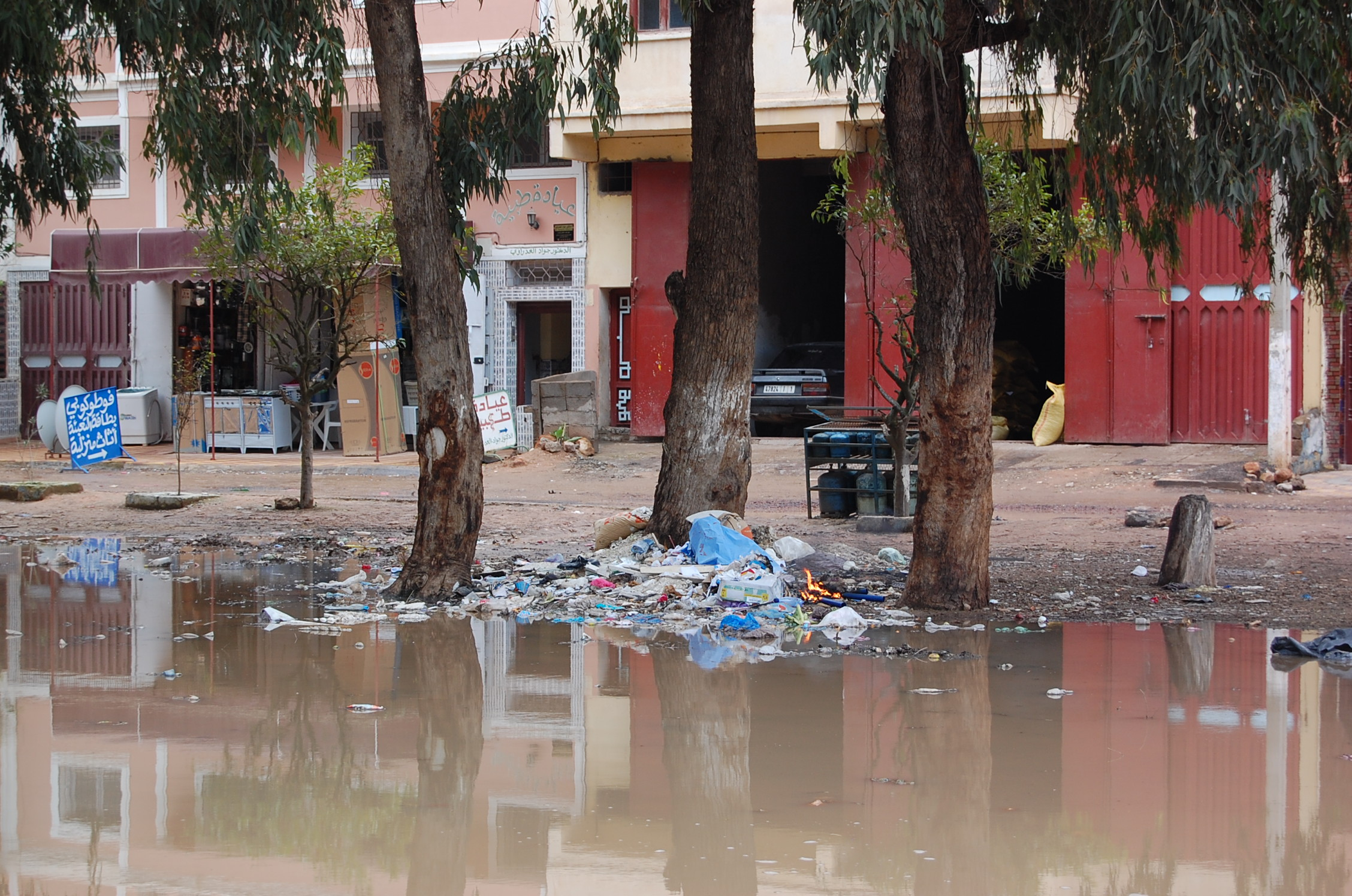 Walon: tapaedje-evoye di plastike dins on ptit bwès (Sidi Smayil, province d' El Djadida, Marok)